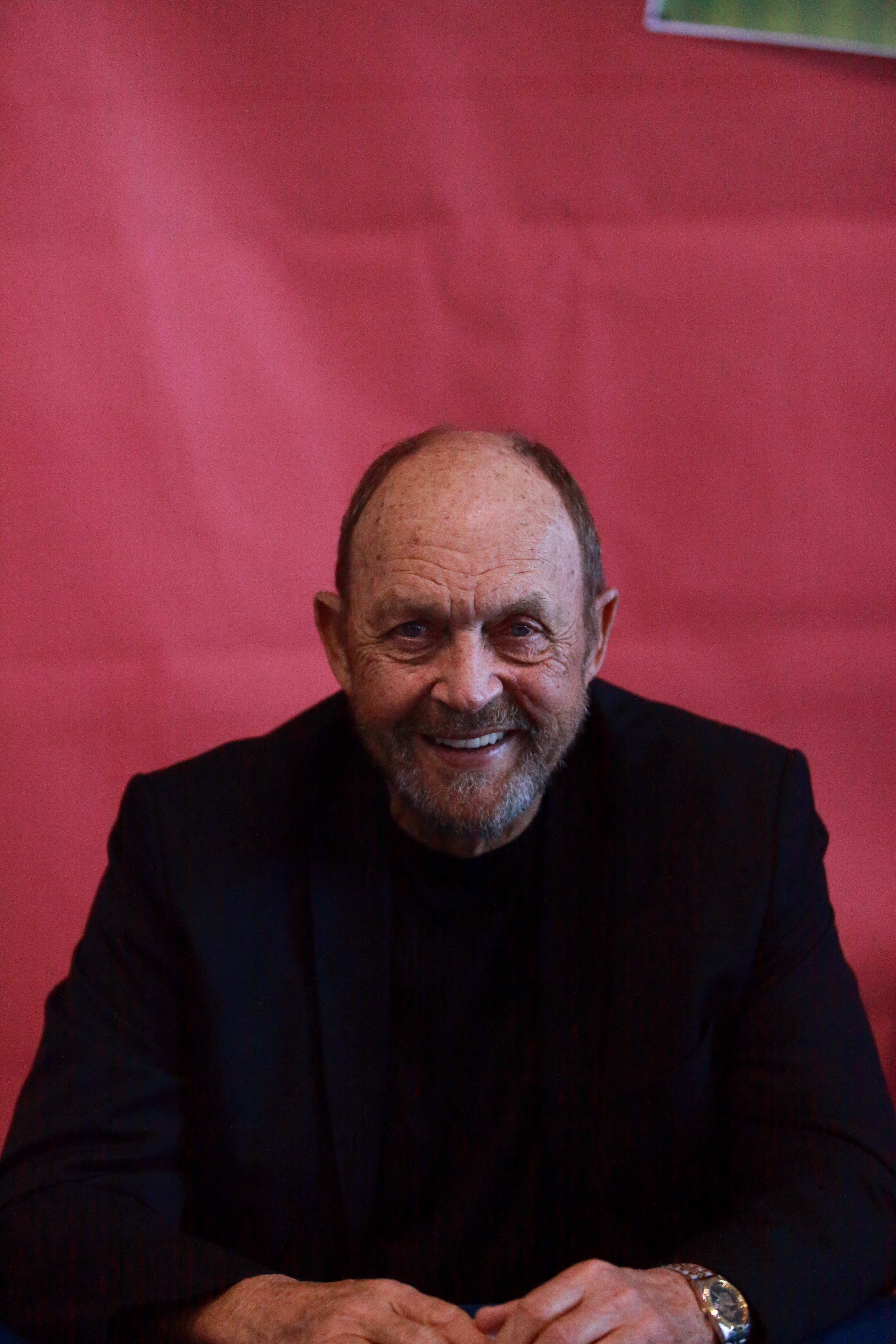 John David AshtonDepicted person: John Ashton – American actor